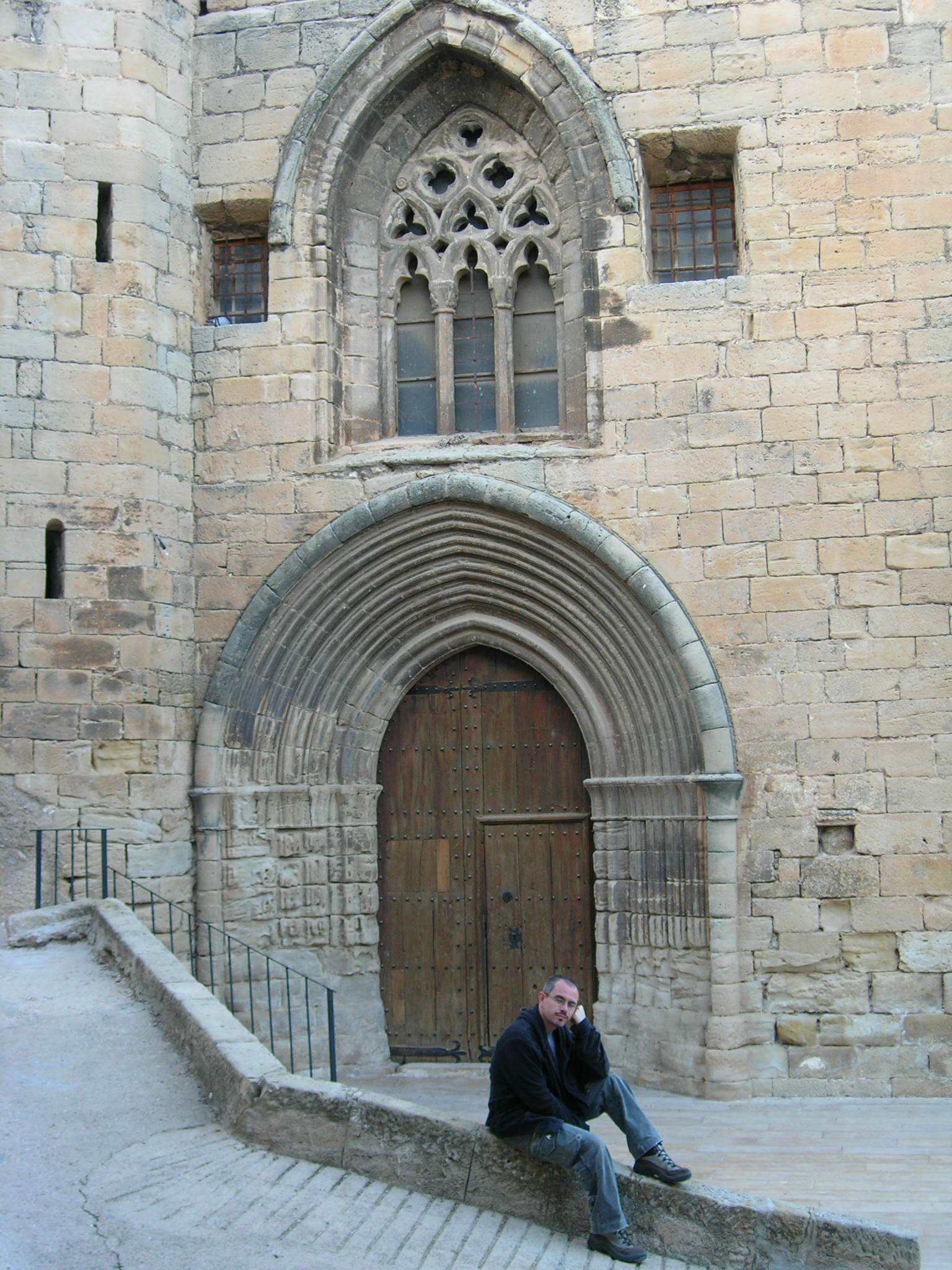 Església de Santiago Apòstol (Lledó d'Algars)